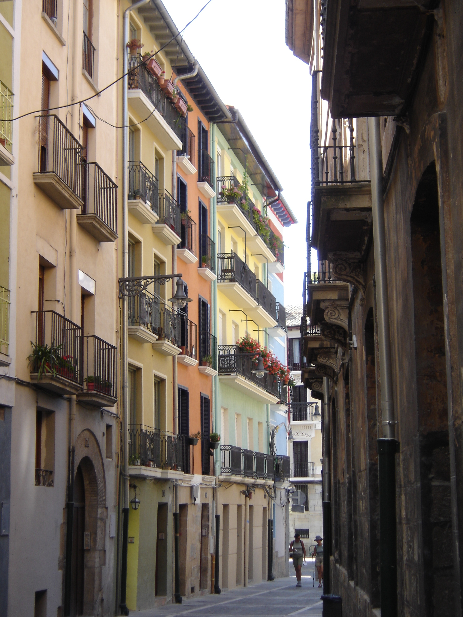 Pamplona